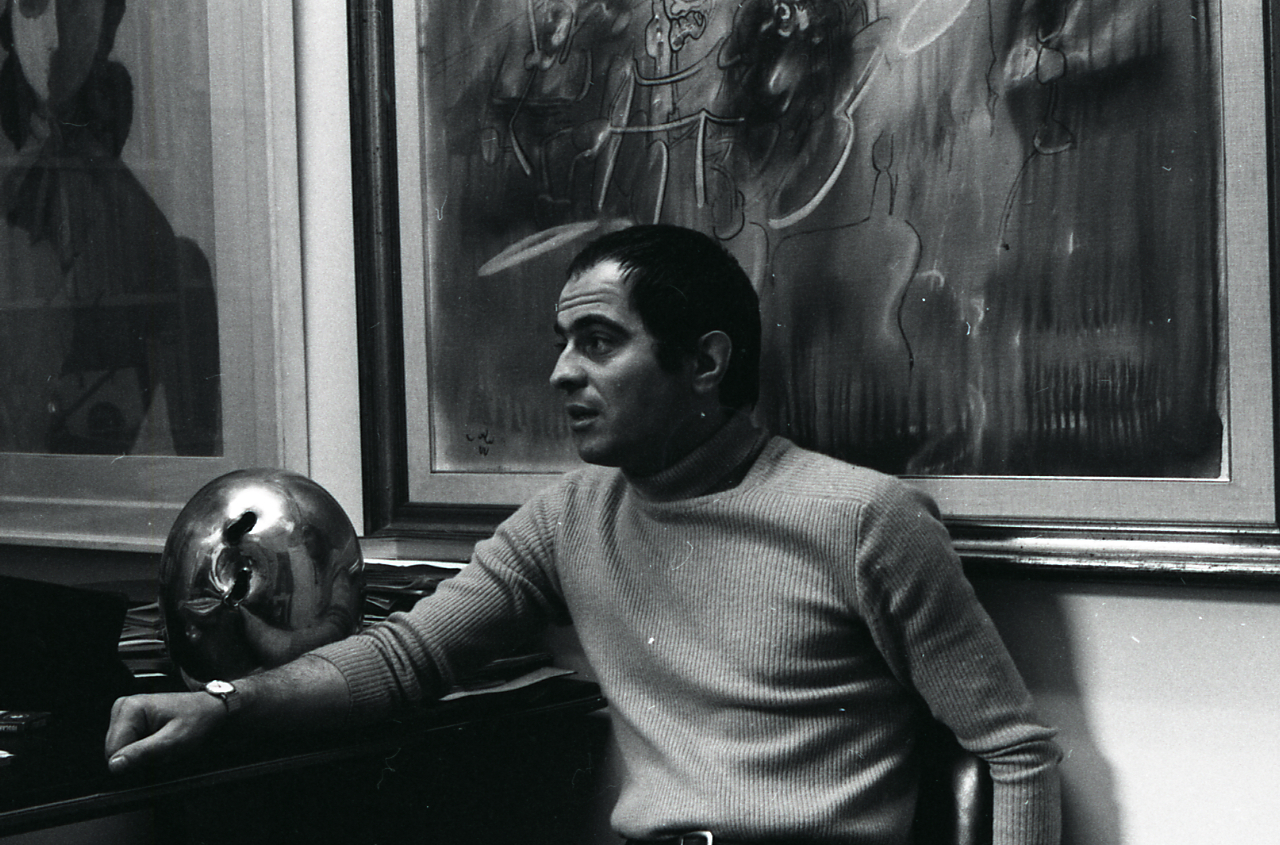 Servizio fotografico : Bologna, 1970 / Paolo Monti. - Strisce: 5, Fotogrammi complessivi: 26 : Negativo b/n, gelatina bromuro d'argento/ pellicola ; 35 mm. - ((I fotogrammi hanno una doppia numerazione. . - Sul portanegativi: Nikormat HP4. - Sul dorso del portanegativi Monti specifica: "20/30 scultura De Vita". - Occasione: Documentazione della mostra di Mario Ceroli presso la Galleria dè Foscherari a Bologna. - : IV. Commesse/ Fattura (1970/06/10), presso Archivio Paolo Monti. - Fonte: Fattura di Paolo Monti